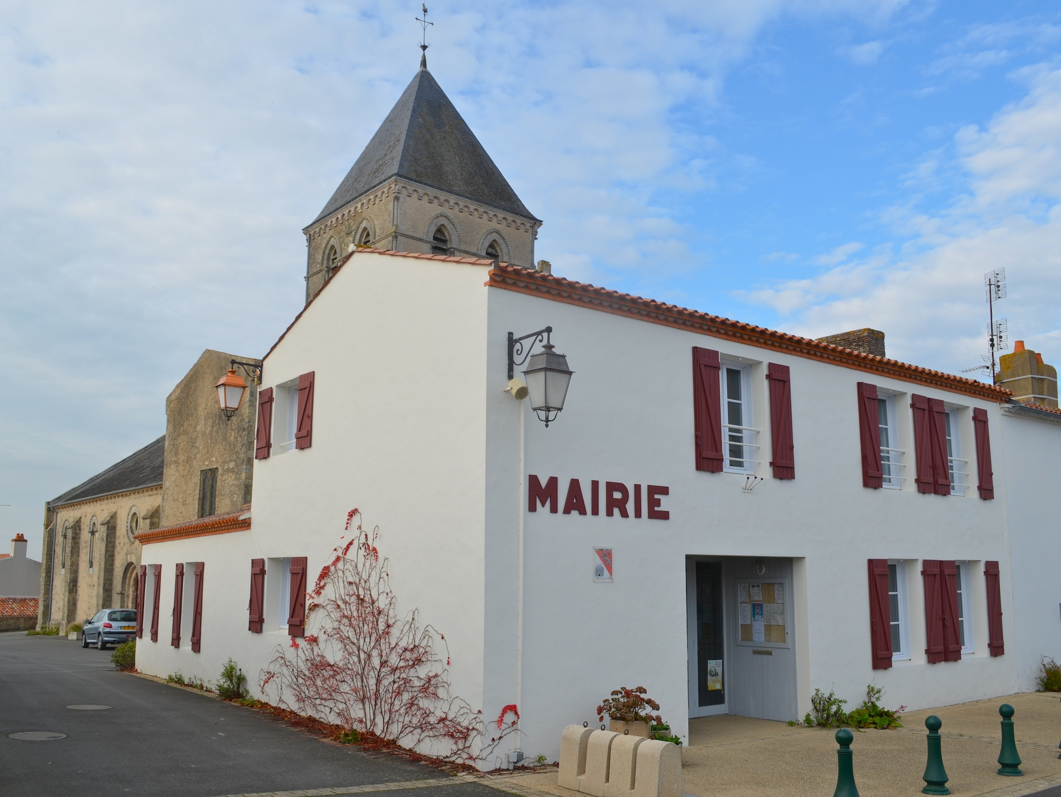 Mairie de La Chaize-Giraud (Vendée)